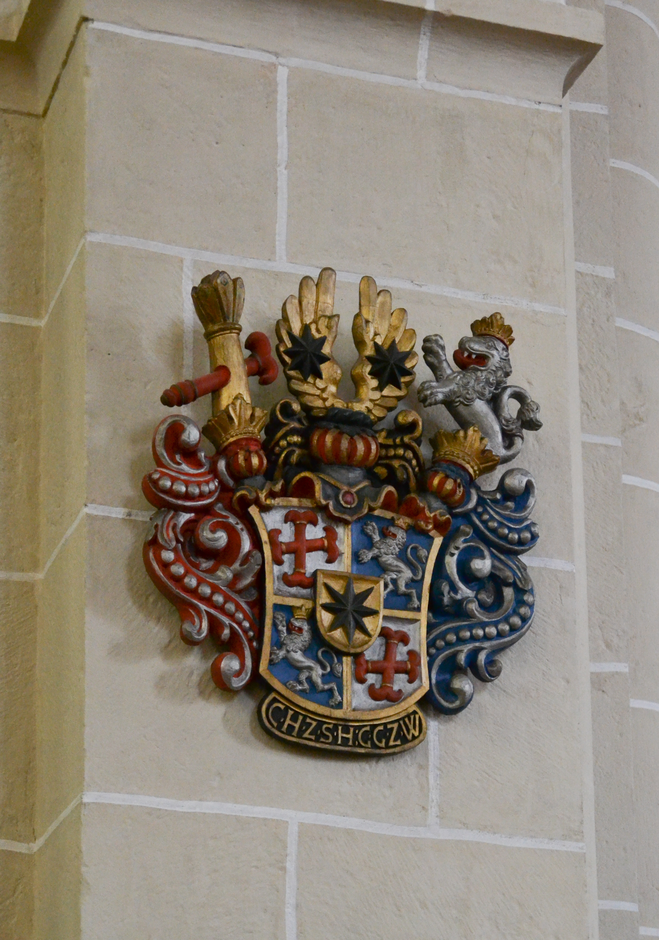 This image shows a heritage building in Germany, located in the North Rhine-Westphalian city Lemgo. Evangelisch-lutherische Kirche St. Nicolai in Lemgo; Wappen der Gräfin Catharina von Waldeck, um 1650